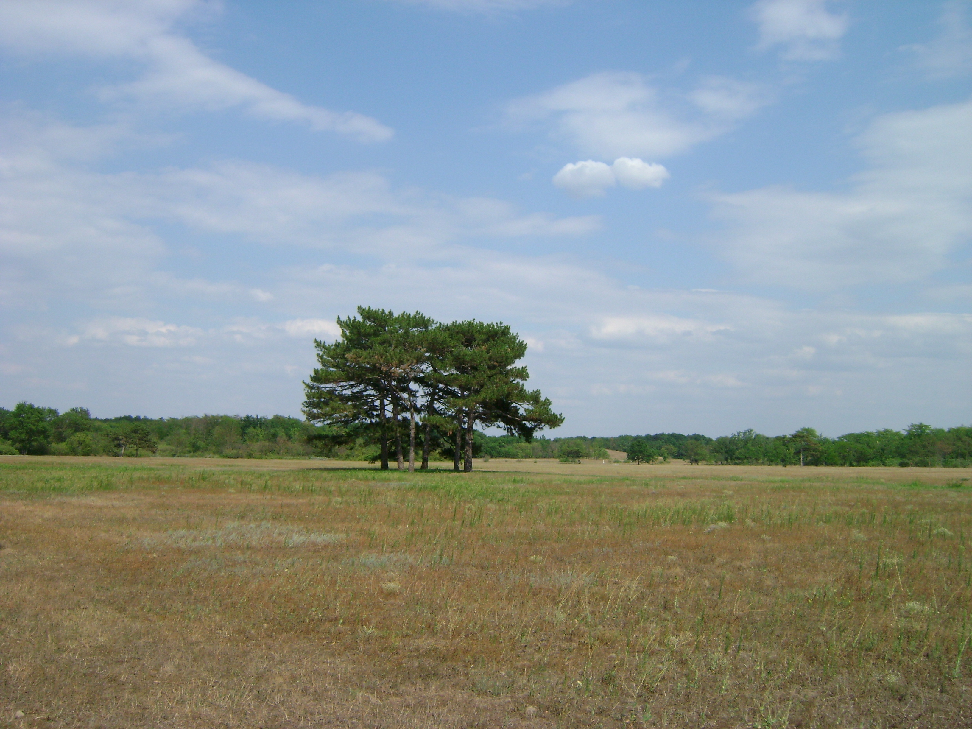 «Асканія-Нова» ім. Ф.Е. Фальц-Фейна, Чаплинський район, смт Асканія-Нова, вул. Фрунзе,13